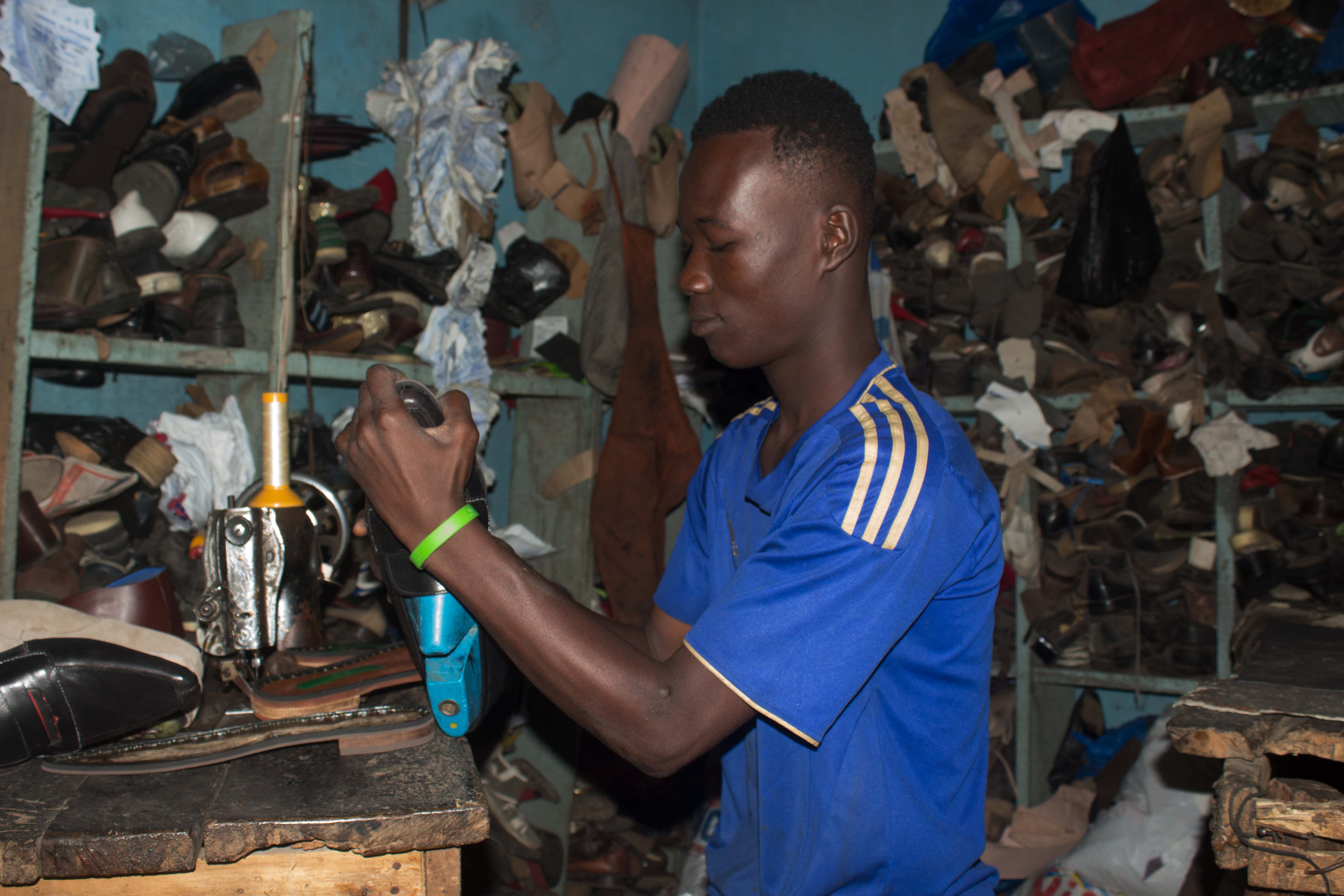 un jeune cordonnier dans la commune de Yopougon à Abidjan This is an image of "African people at work" from Ivory Coast